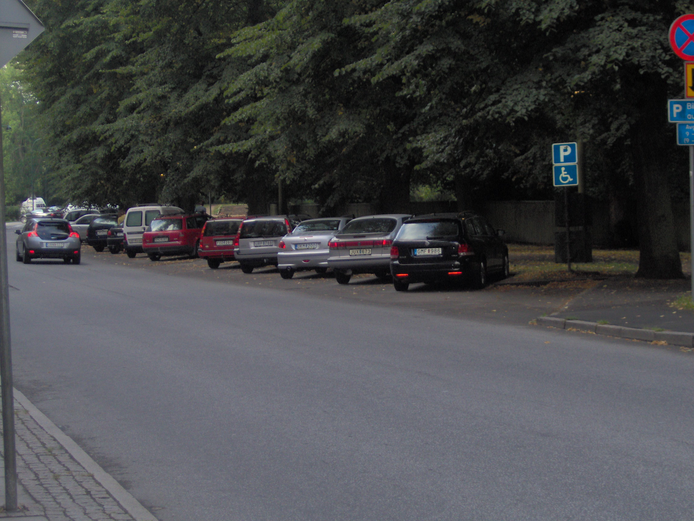 Ett exempel på gatubilden vid vinkelparkering längs med gatan. Fotot taget på Gyllenkroks Allé i Lund.